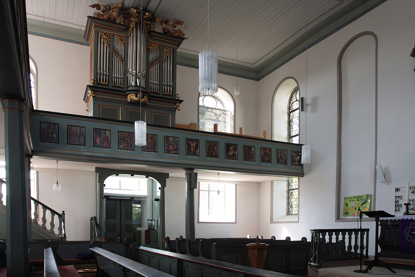 Innenraum der Ev. Kirche Atzbach, Lahnau, Lahn-Dill-Kreis, Hessen, Deutschland